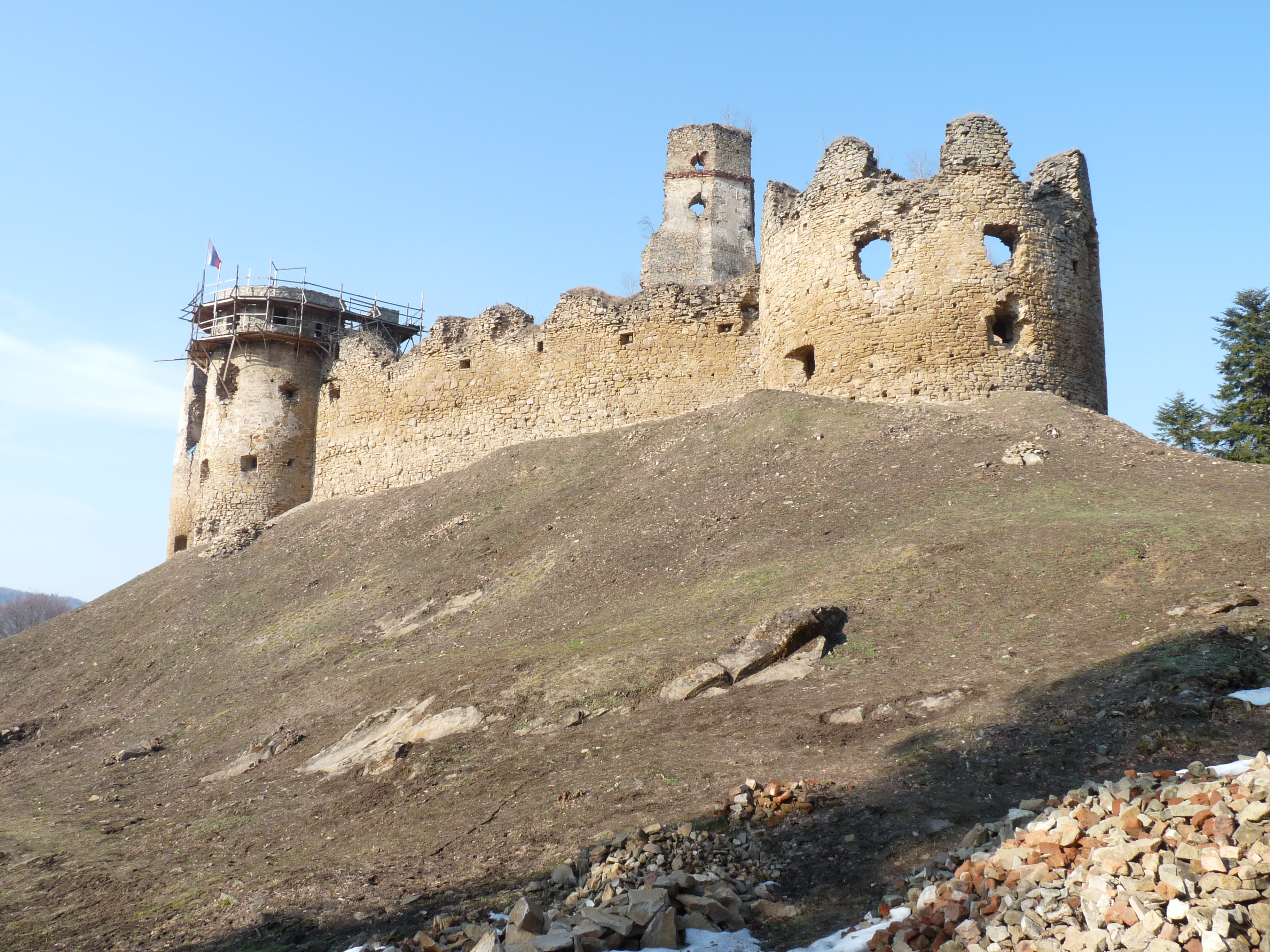 Pohľad od brány na horný hrad